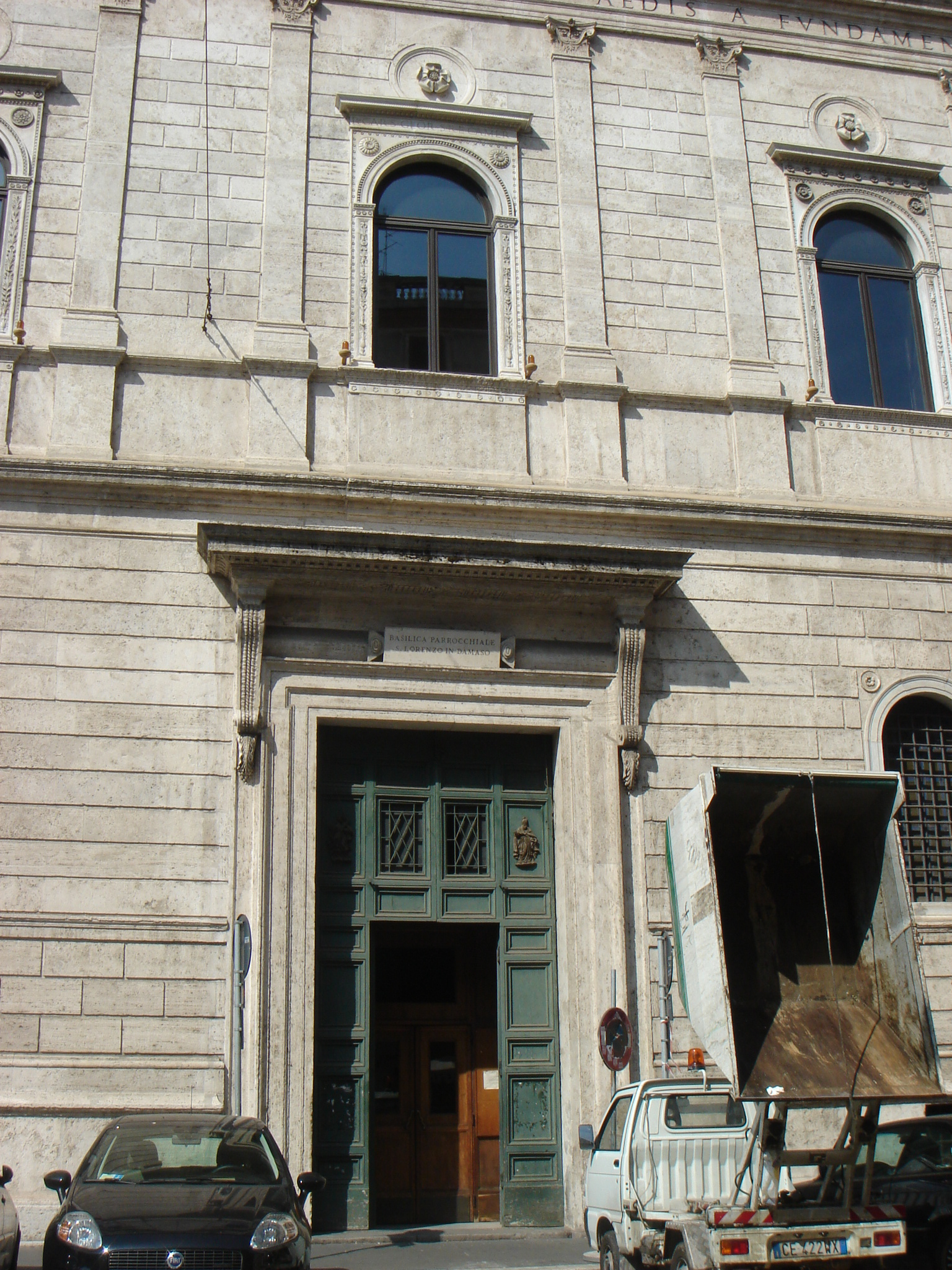 Roma, San Lorenzo in Damaso: entrata nel Palazzo della Cancelleria